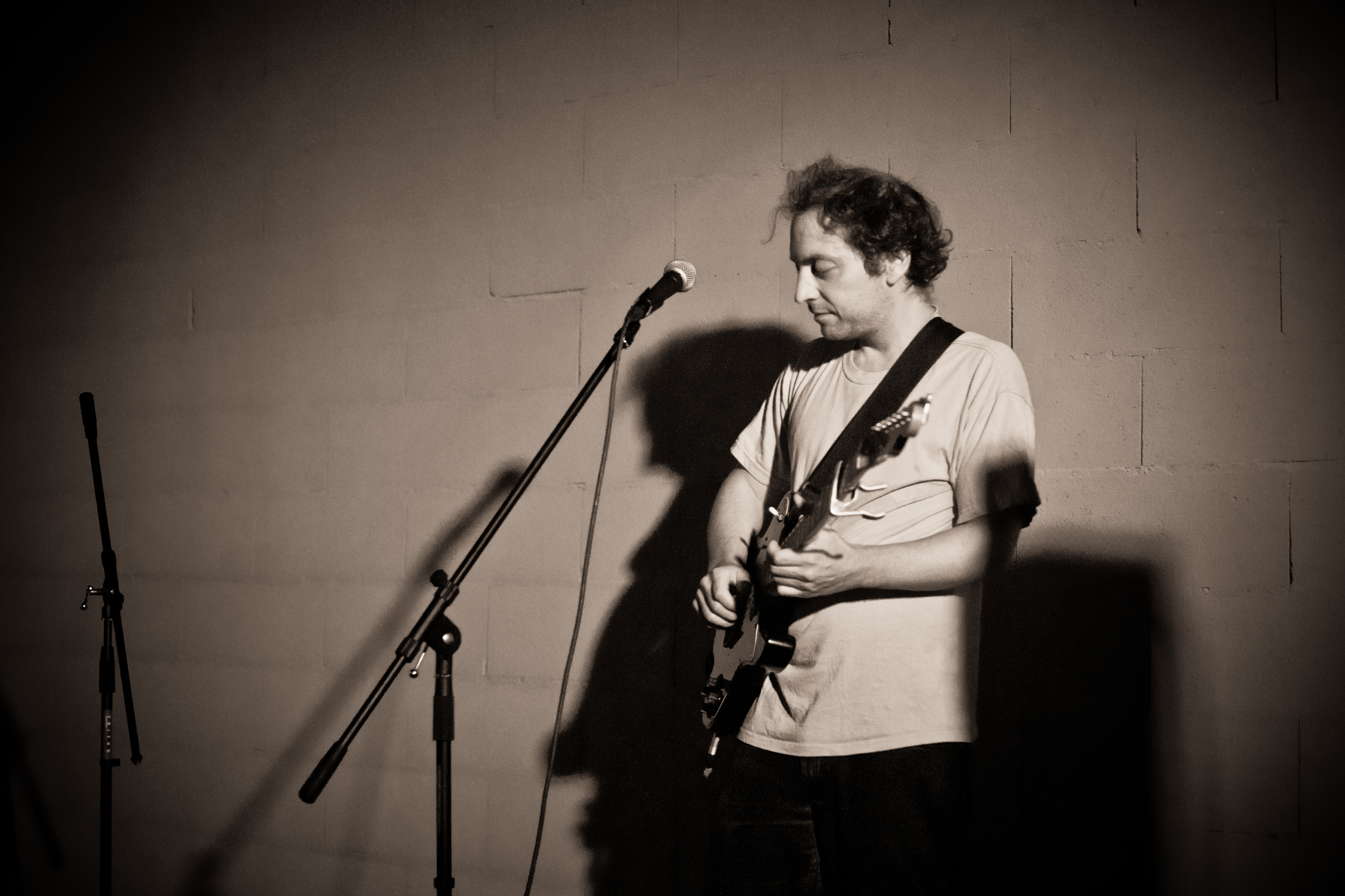 Mathieu Boogaerts à La Datcha (Lausanne) le 28 septembre 2011.